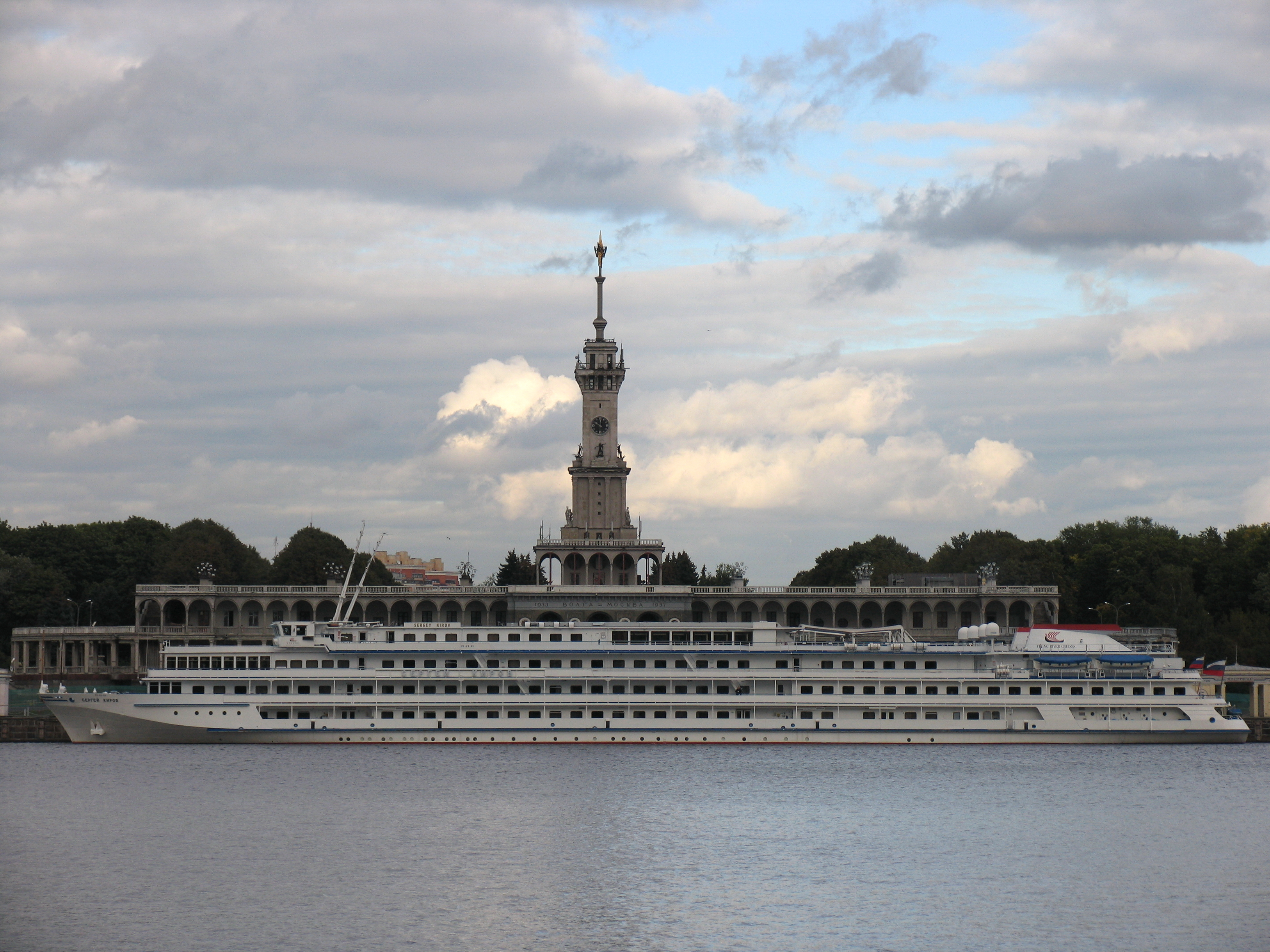 Речной круизный теплоход "Сергей Киров" на фоне Северного речного вокзала. Москва.